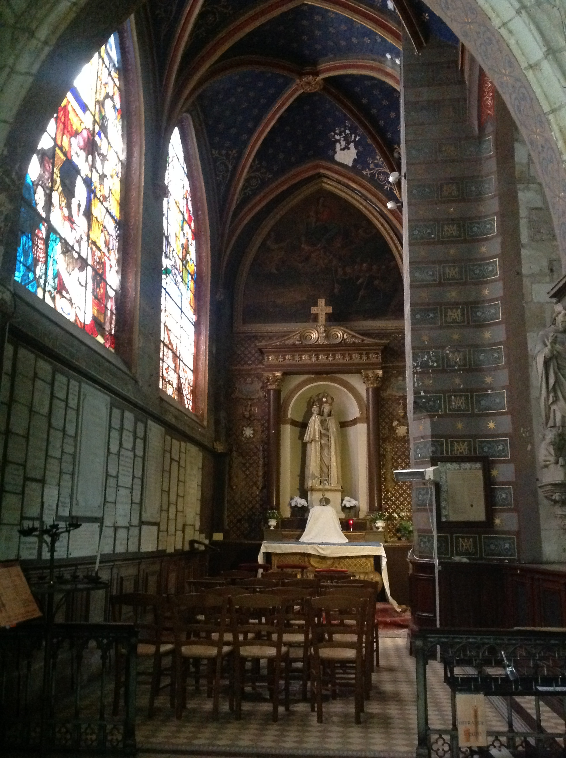 Eglise Saint-Saturnin (Blois)